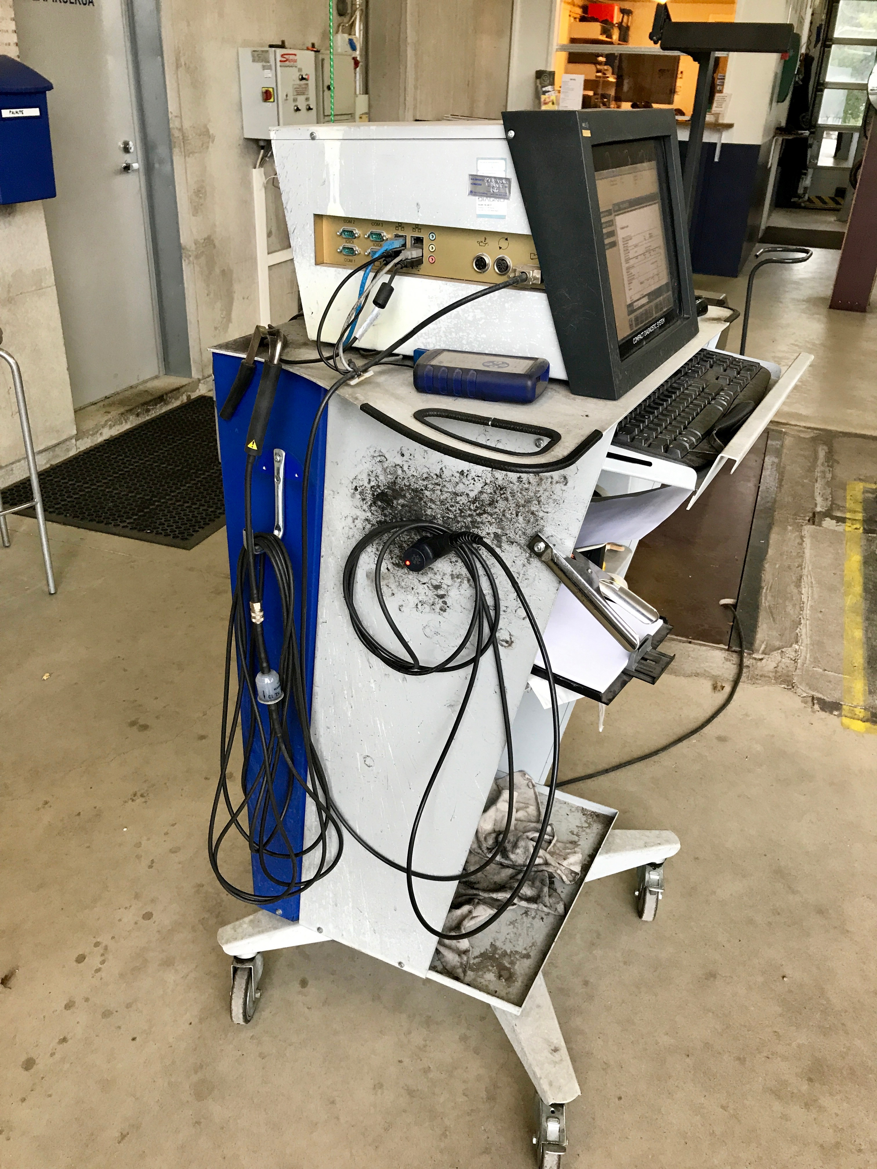 Pakokaasuanalysaattori katsastusasemalla